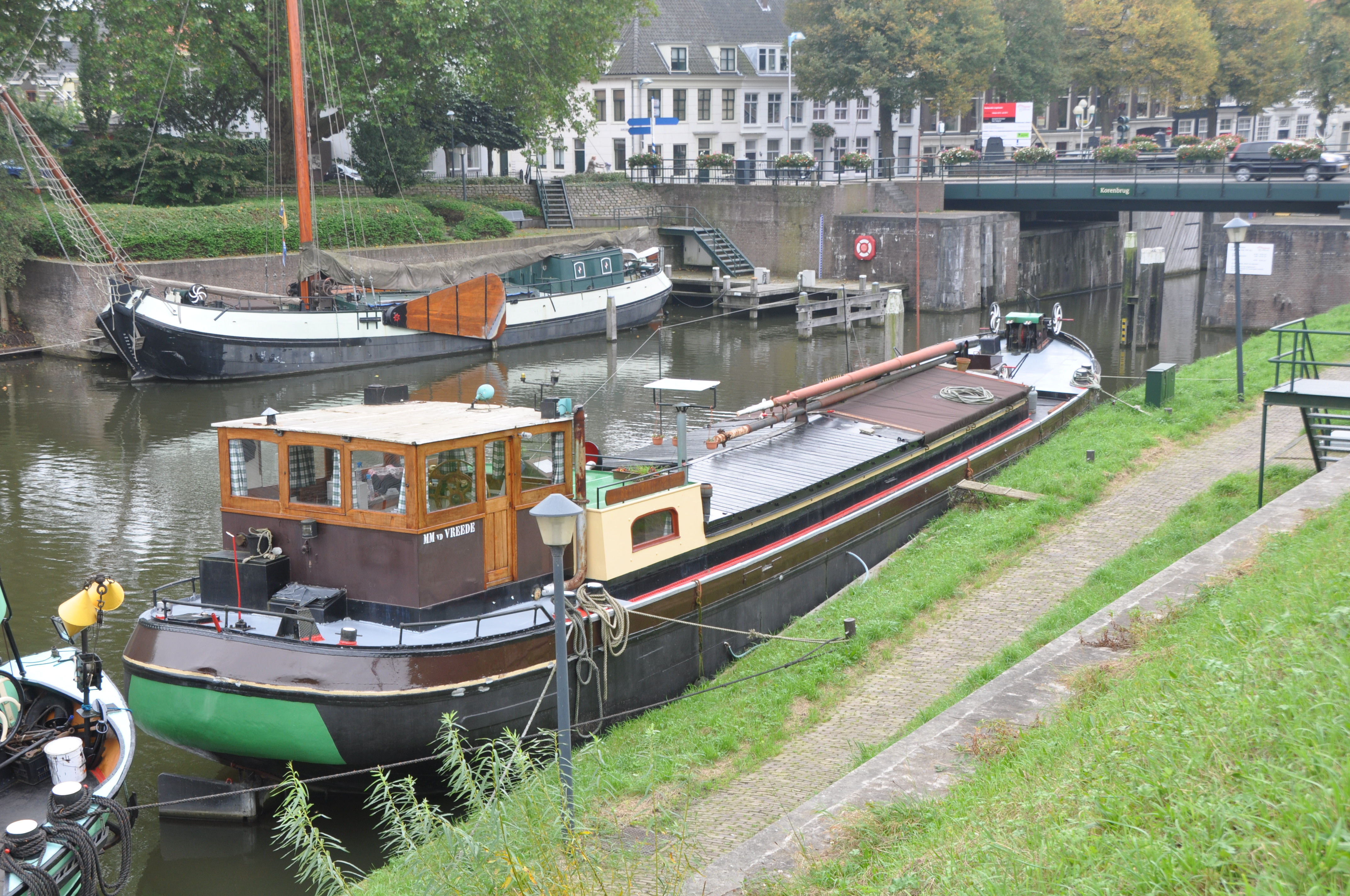 De VERANDERING voor de wal in de museumhaven van Gorinchem